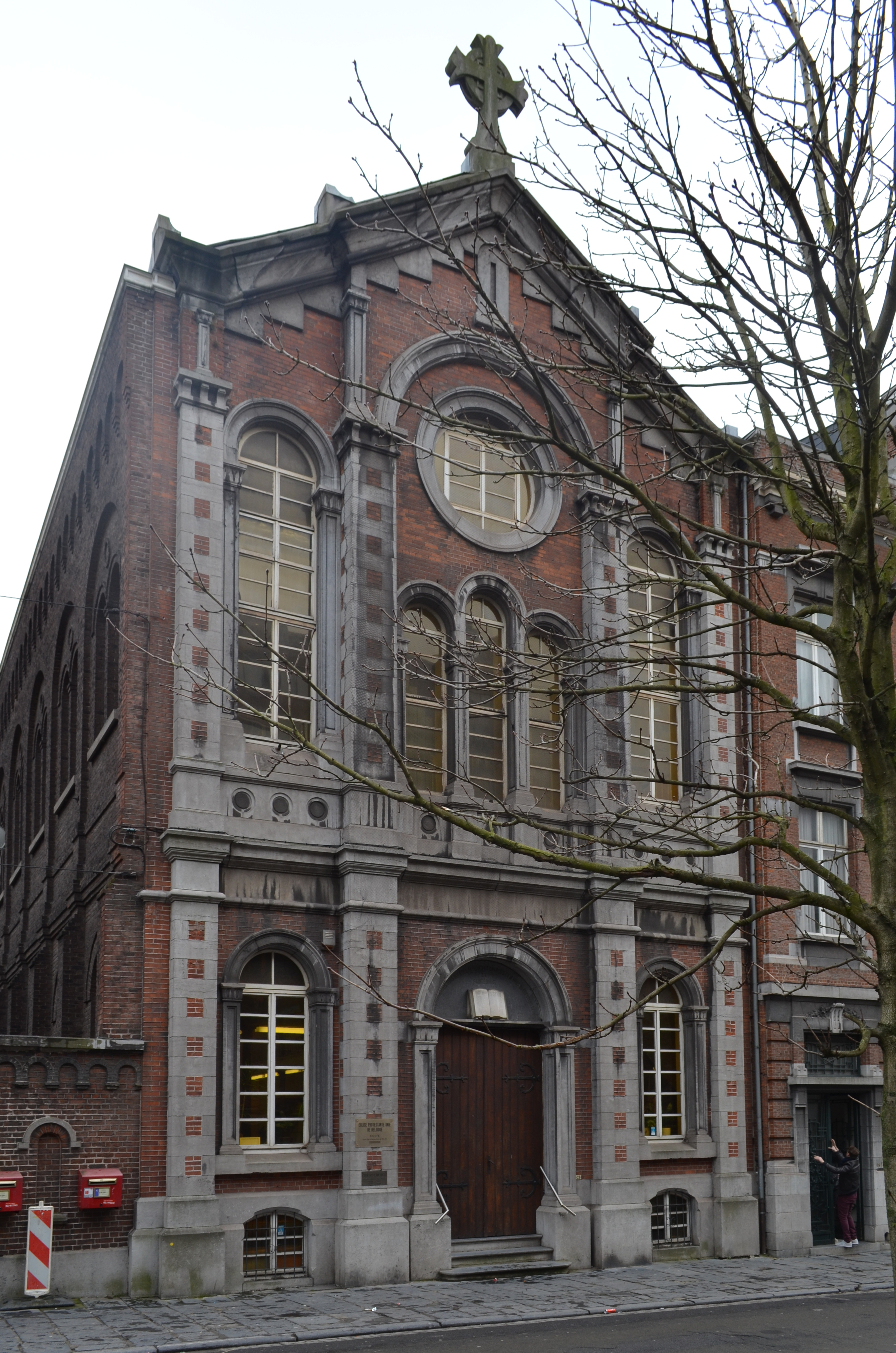 Charleroi (Belgique) - Temple protestant - Construction 1880 - architecte E. Dubois. Bâtiment classé en 1990.